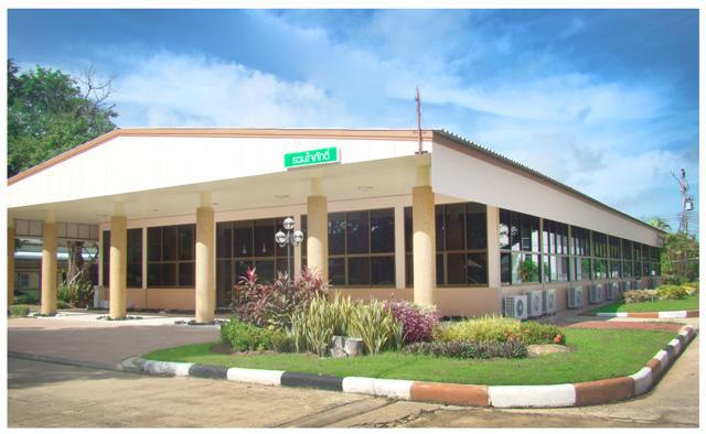 หอประชุมรวมใจภักดิ์ โรงเรียนขุขันธ์